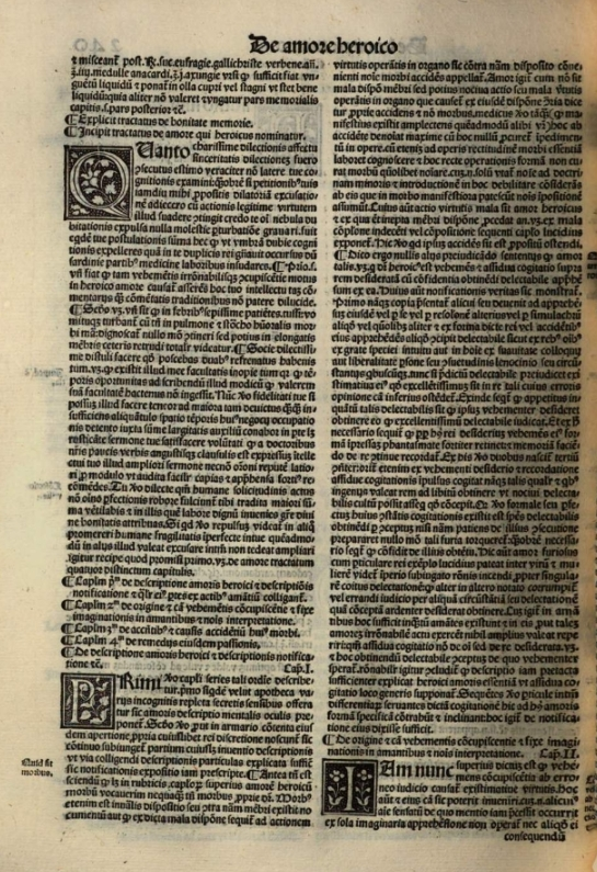 Arnaldus_de_Villa_Nova, "de_amore_heroico" from Opera (Venice, 1527) first page